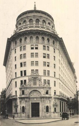 Vista del edificio del Banco de Boston (luego BankBoston) en Buenos Aires. Esquina de Florida y Diagonal Norte, hoy funciona como sede del Standard Bank.